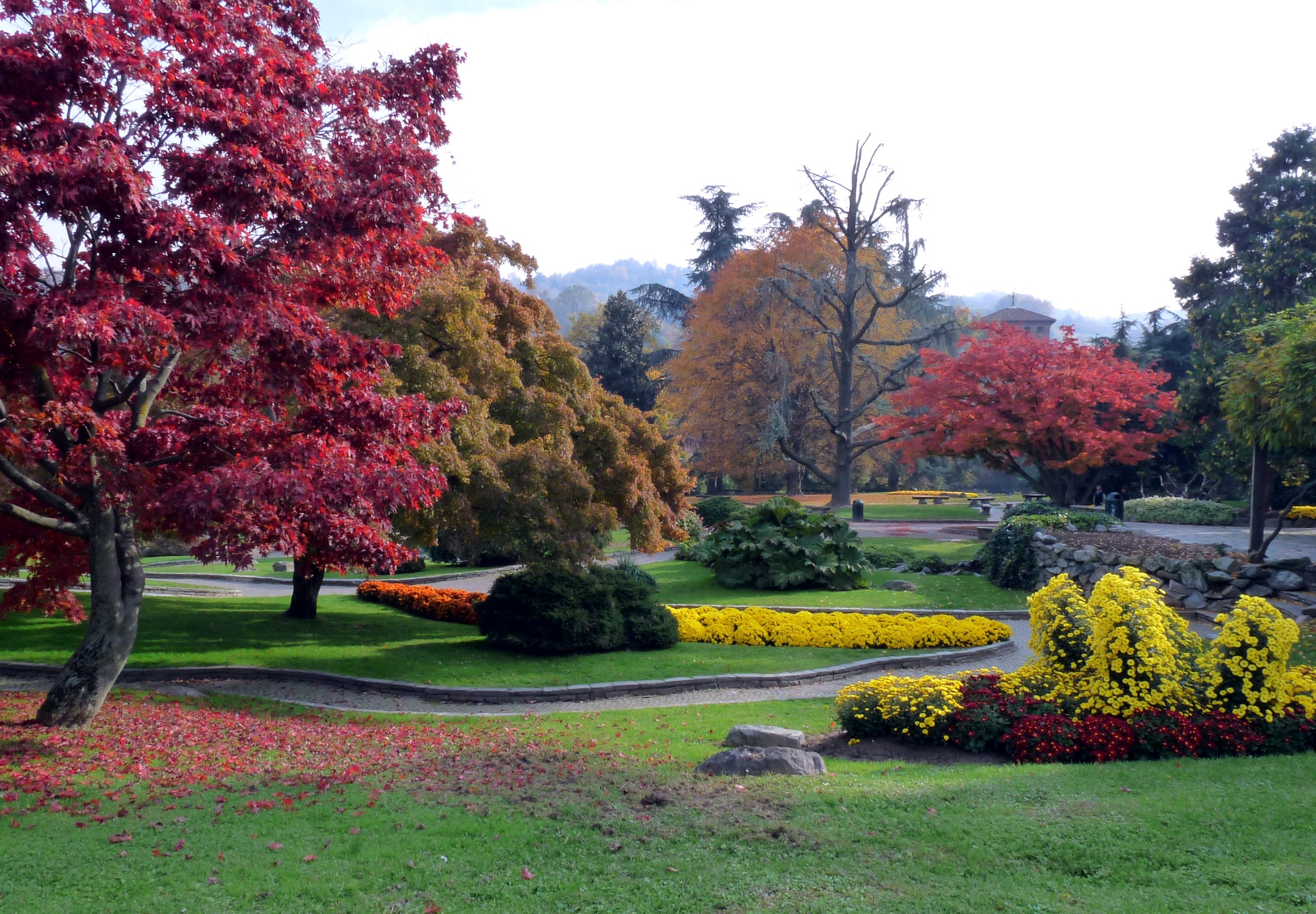 Autumn colors